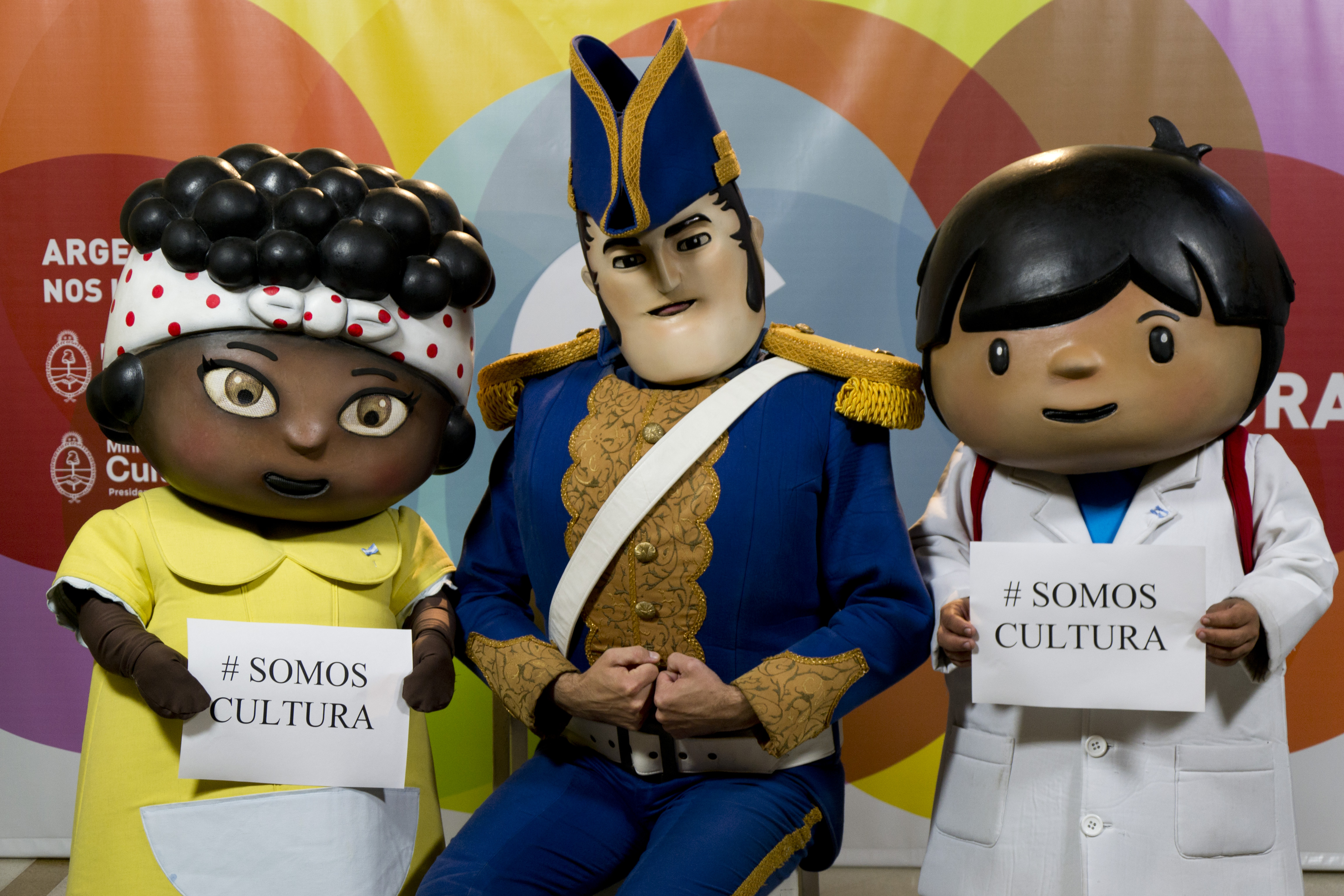 Buenos Aires, 25 de mayo de 2014 - La fiesta patria del 25 de mayo se realizó en Plaza de Mayo con shows para chicos, recitales, espectáculos de danza, programas de la TV Pública en vivo, y un gran cierre musical a cargo de un seleccionado de artistas representantivos de las músicas del país, desde la cumbia hasta el tango: “La asombrosa banda de Zamba”, el grupo Desmán –ganador del concurso federal de bandas juveniles “Maravillosa Música”–, el espectáculo “Payadores vs. Raperos”, el trío de rock Científicos del palo, y la participación de la banda del Regimiento de Granaderos a Caballo "General San Martín", interpretando un repertorio popular. La segunda parte del espectáculo contó con el Combinado Argentino de Danza musicalizado por Metabombo y Tremor, la actuación del coro toba Qom Chelaalapi, y un desfile de indumentaria con diseño argentino. Bajo el lema “Somos Cultura”, el cierre, producido por Lito Vitale, con la participación de Pedro Aznar, Kevin Johansen, Gladys La Bomba Tucumana, Hilda Lizarazu, David Lebon, Juan Carlos Baglietto, Susana Rinaldi, Silvina Garré, Patricia Sosa, Litto Nebbia, Fabiana Cantilo, Víctor Heredia, Sandra Mihanovich, la Bersuit, Nicolás Ledesma, Joaquín Benitez, Alejandro Lerner, Palo Pandolfo, Tonolec, Orozco Barrientos, Peteco Carabajal, Orquesta Popular de Càmara Los Amigos del Chango, Verónica Condomi, Koki y Pajarín Saavedra, Gabo Ferro, Liliana Vitale, La Bomba del Tiempo, Carajo y Adriana Varela, la Bersuit, entre otros artistas y bandas de primer nivel. Fotos: Ministerio de Cultura de la NaciÃ³n.